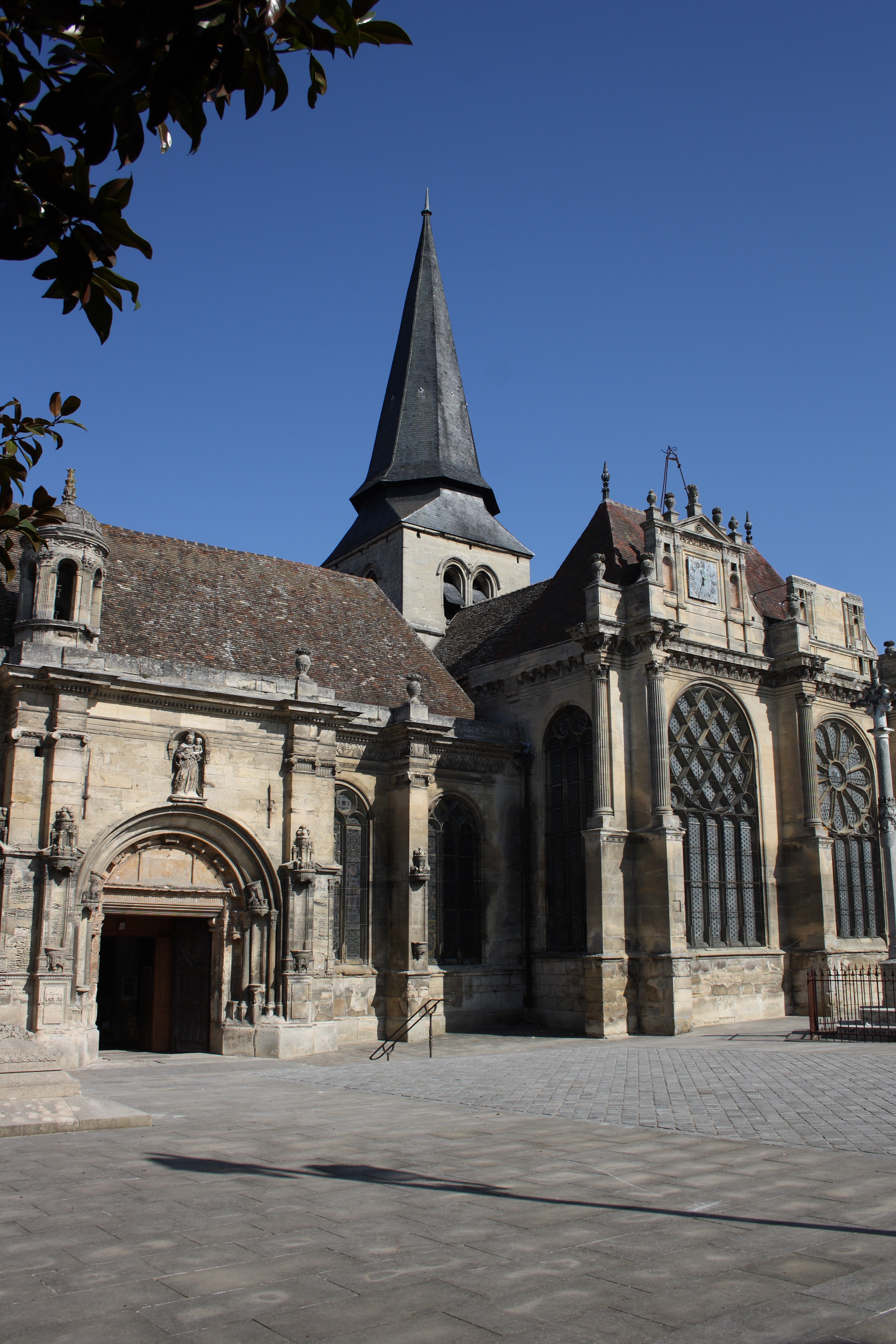 Renaissancefassade der Kirche Notre-Dame-de-la-Nativité in Magny-en-Vexin